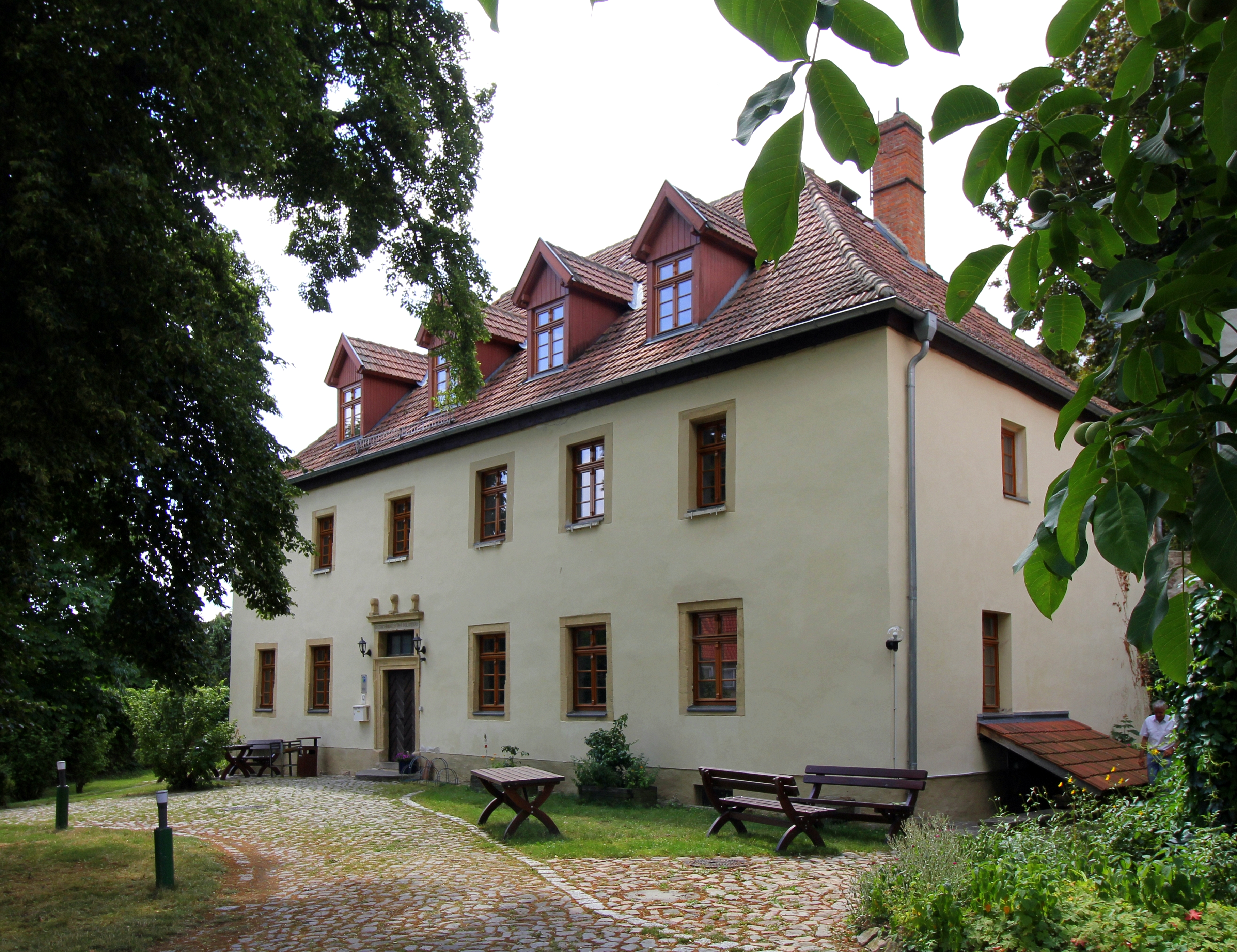 Mauritiushaus Walter-Rathenau-Straße 19 in Niederndodeleben